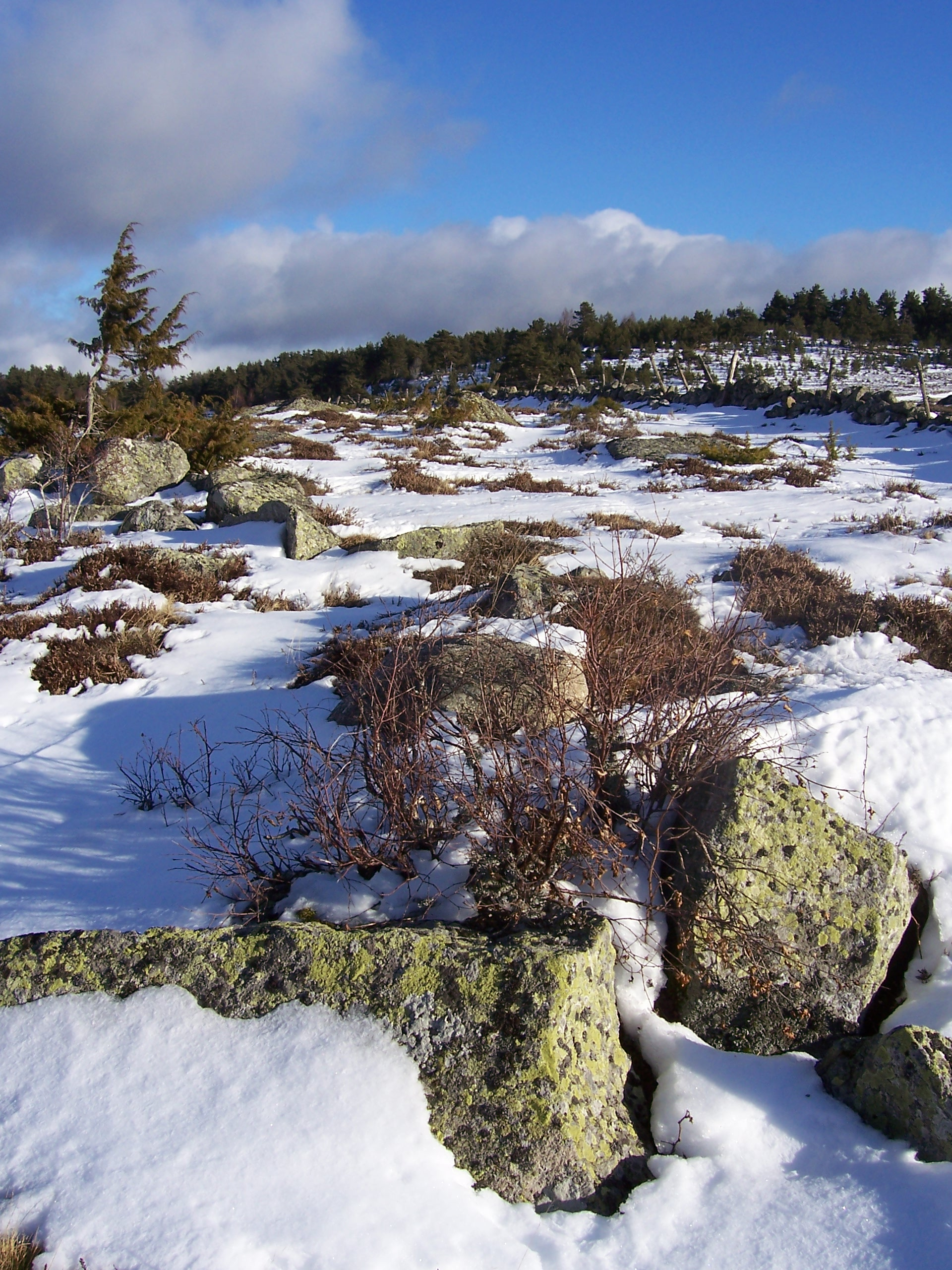 Randonnée en hiver dans les environs de Marvejols.